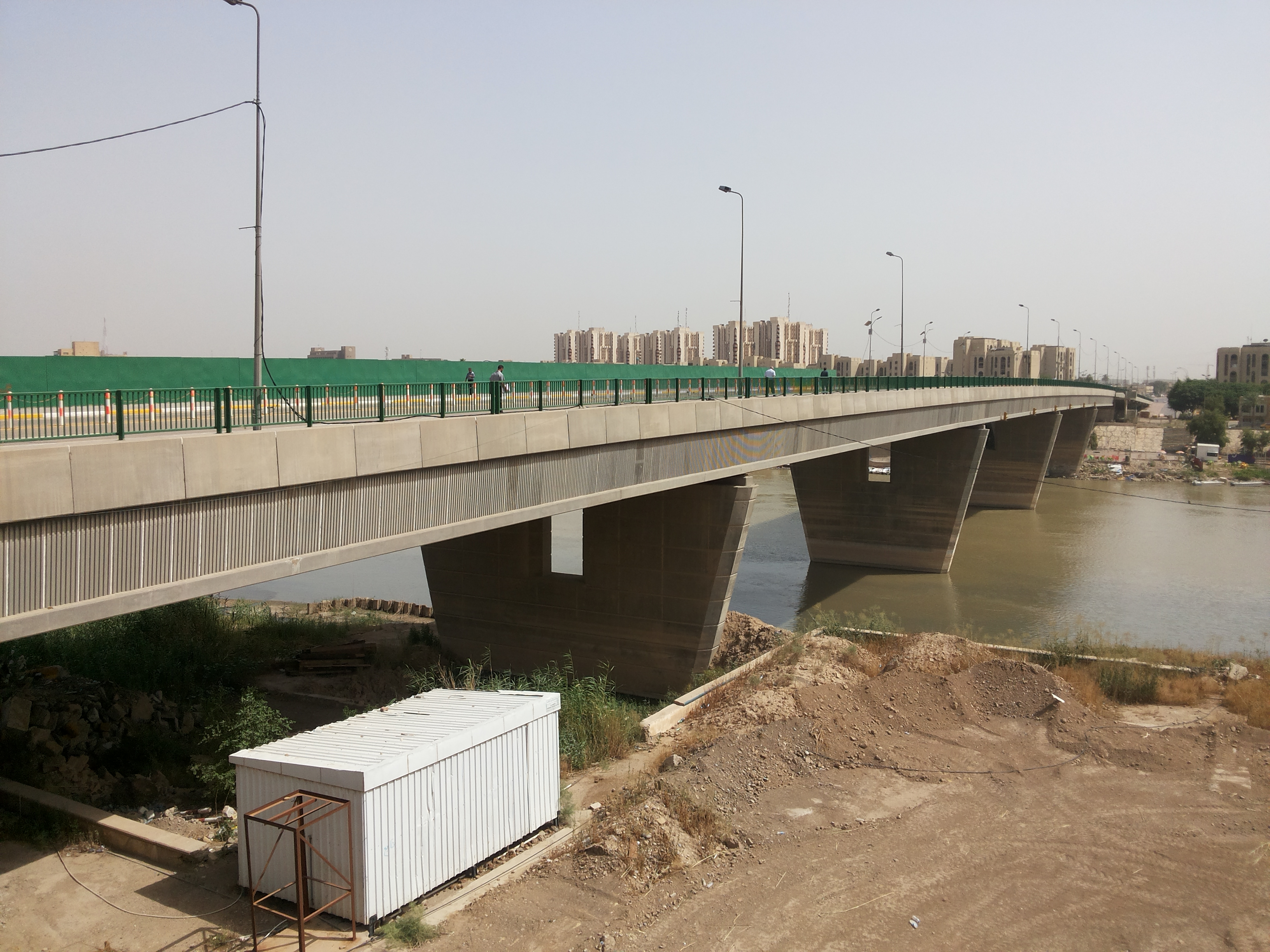 Bab Al Muazham Bridge